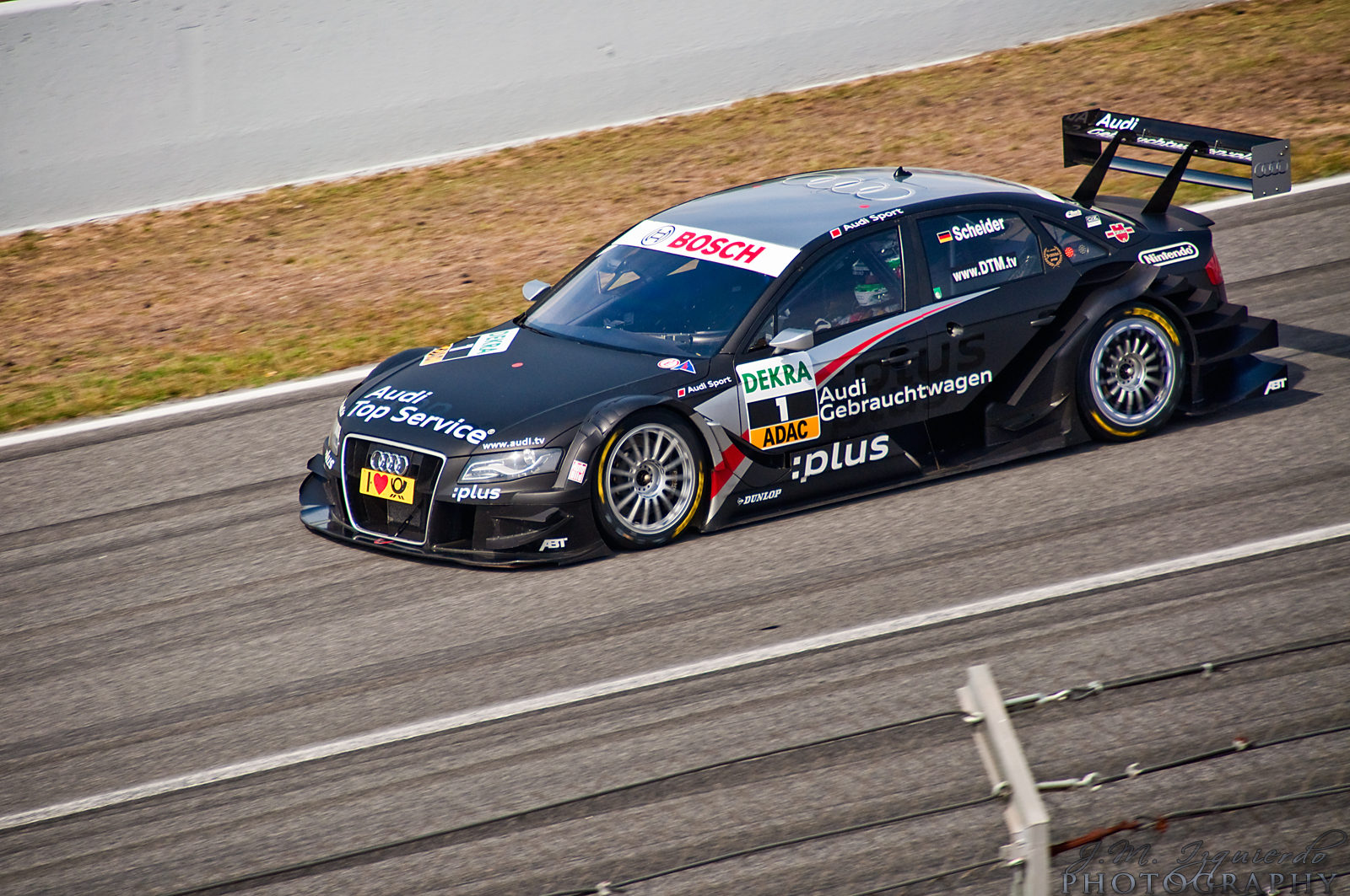 Nikon D90 + Sigma 18-200 DC OS HSM 1/1000s - F/8 - 135mm - ISO400